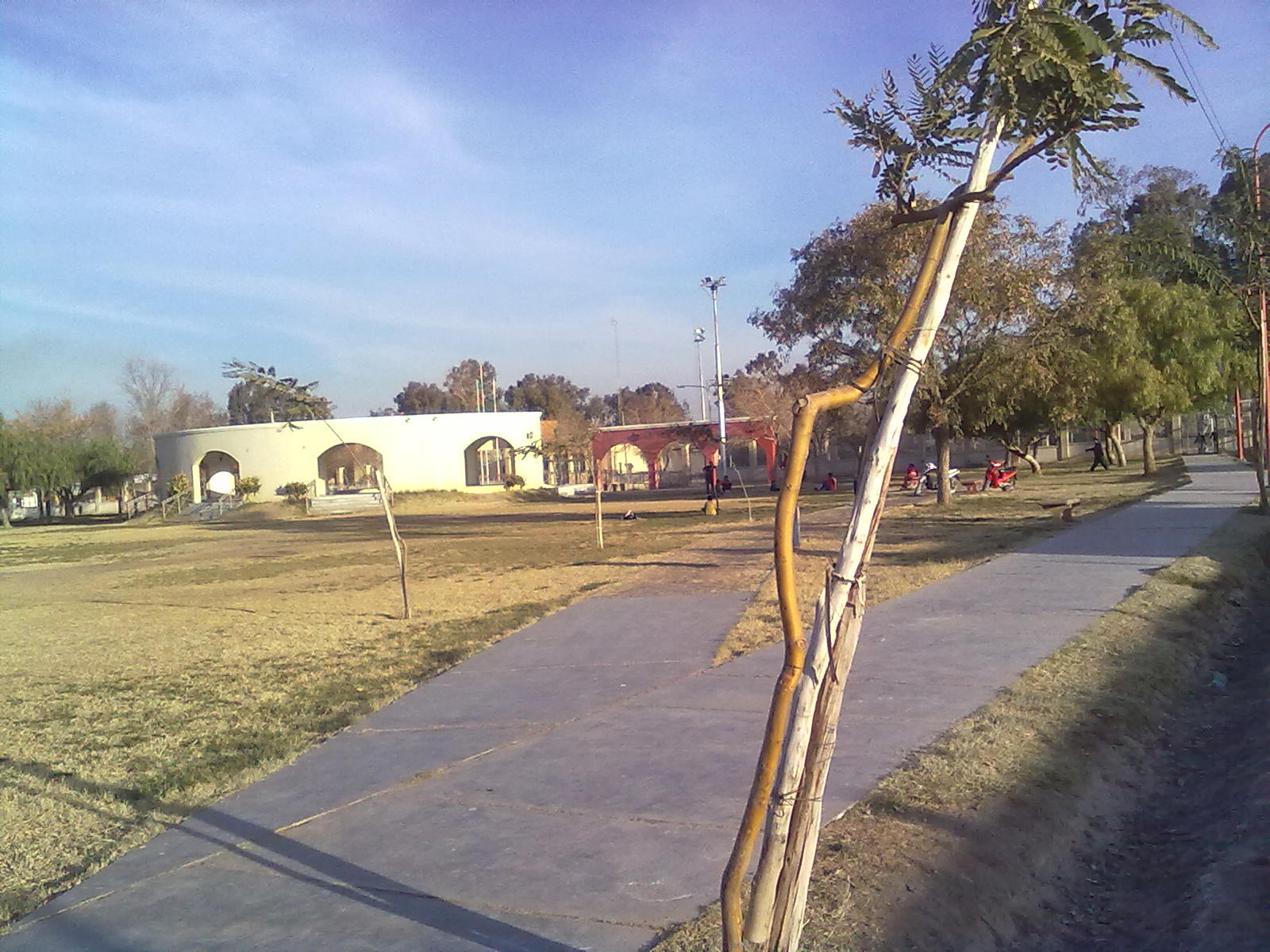 el parque departamental en pleno invierno